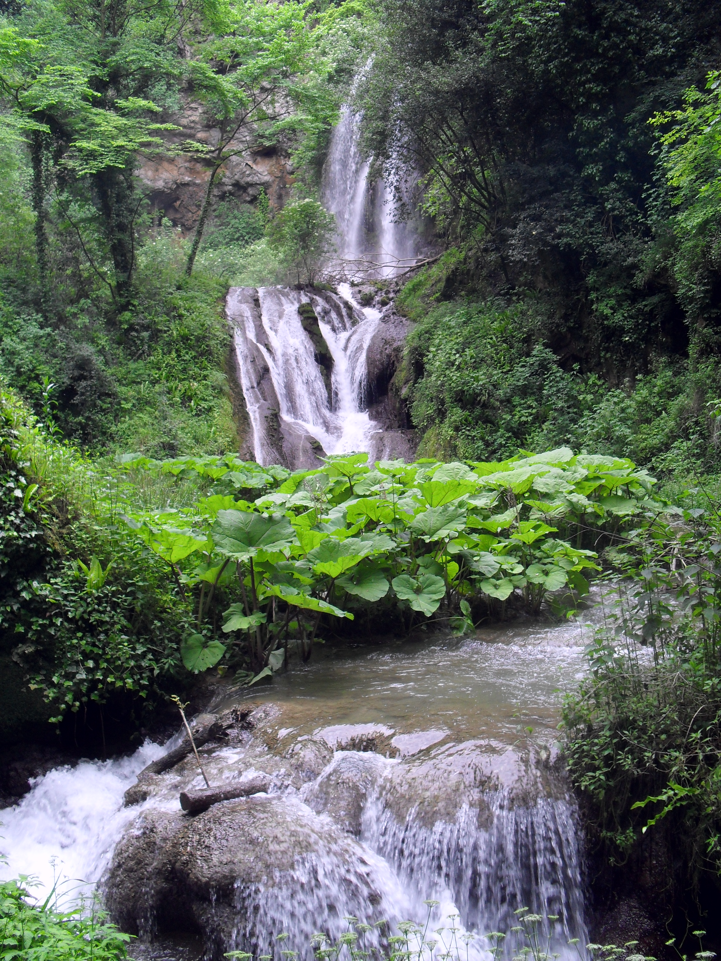 Cascate della Grotta delle Sirene (Tivoli, villa Gregoriana)